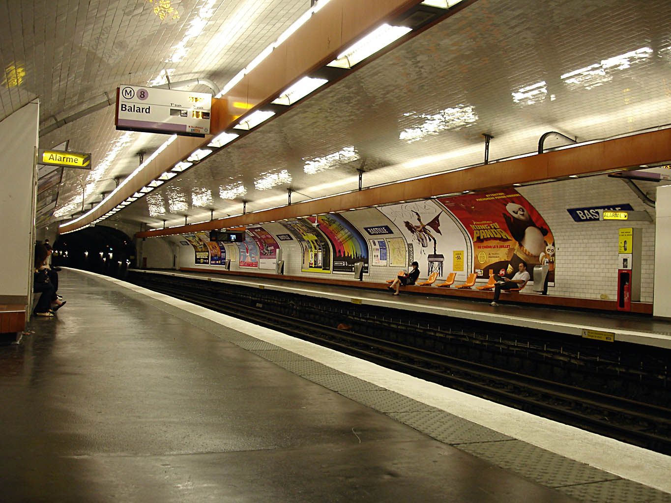 La station Bastille de la ligne 8 du métro de Paris, France